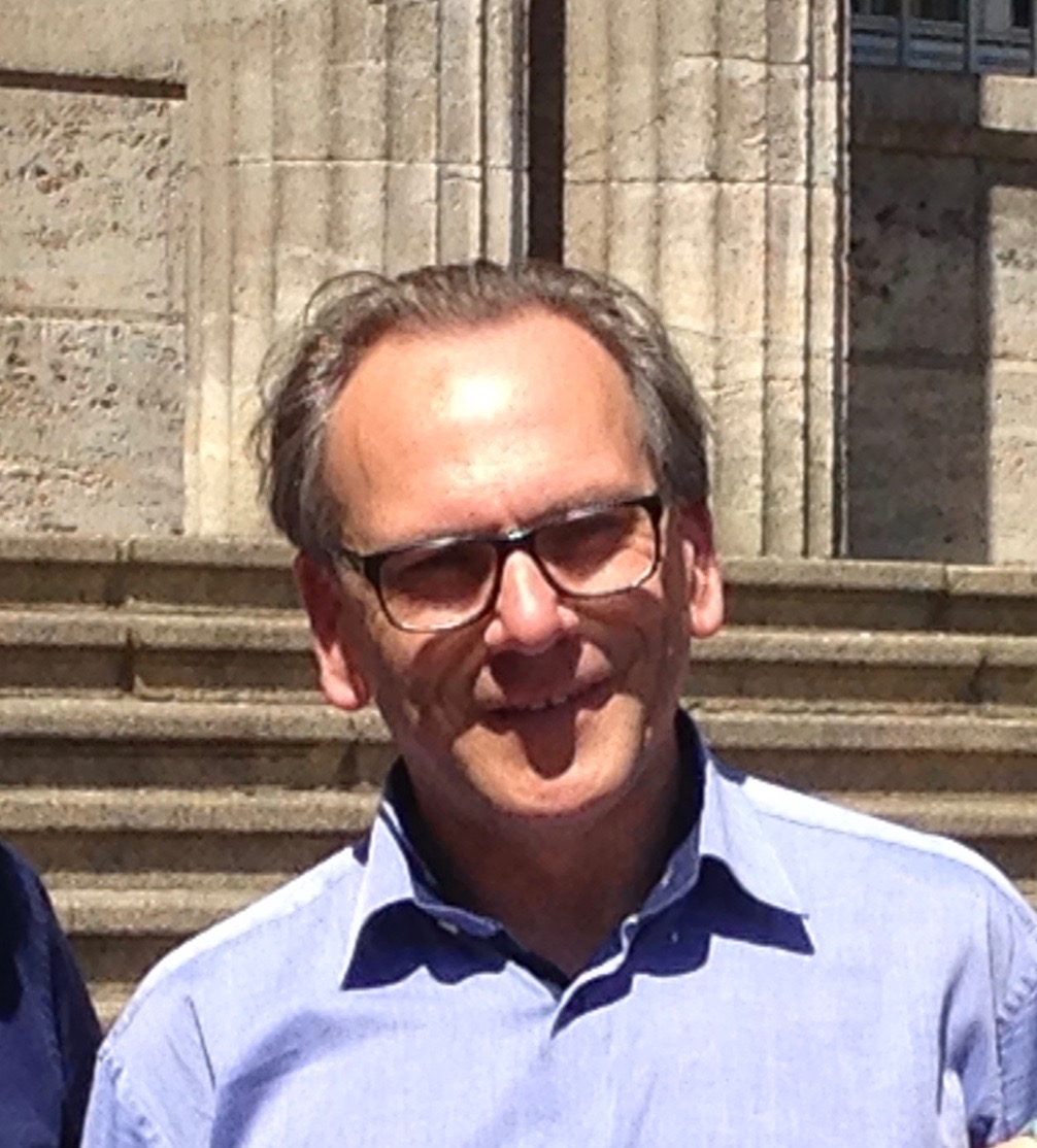 Oberbürgermeister Andreas Mucke bei der Preisverleihung vom "4. Wuppertaler Entenrennen 2016"